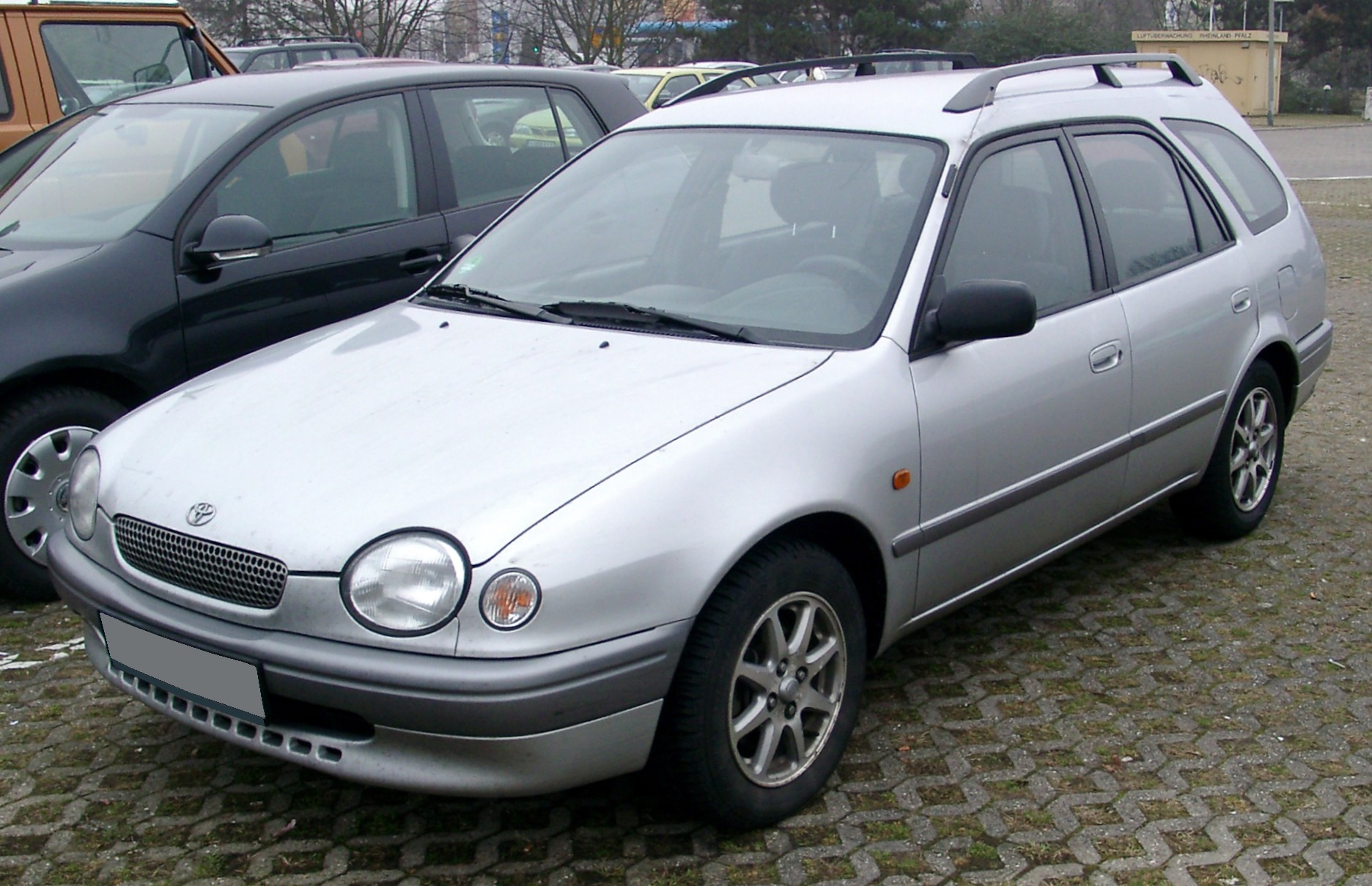 Toyota Corolla E11 Kombi